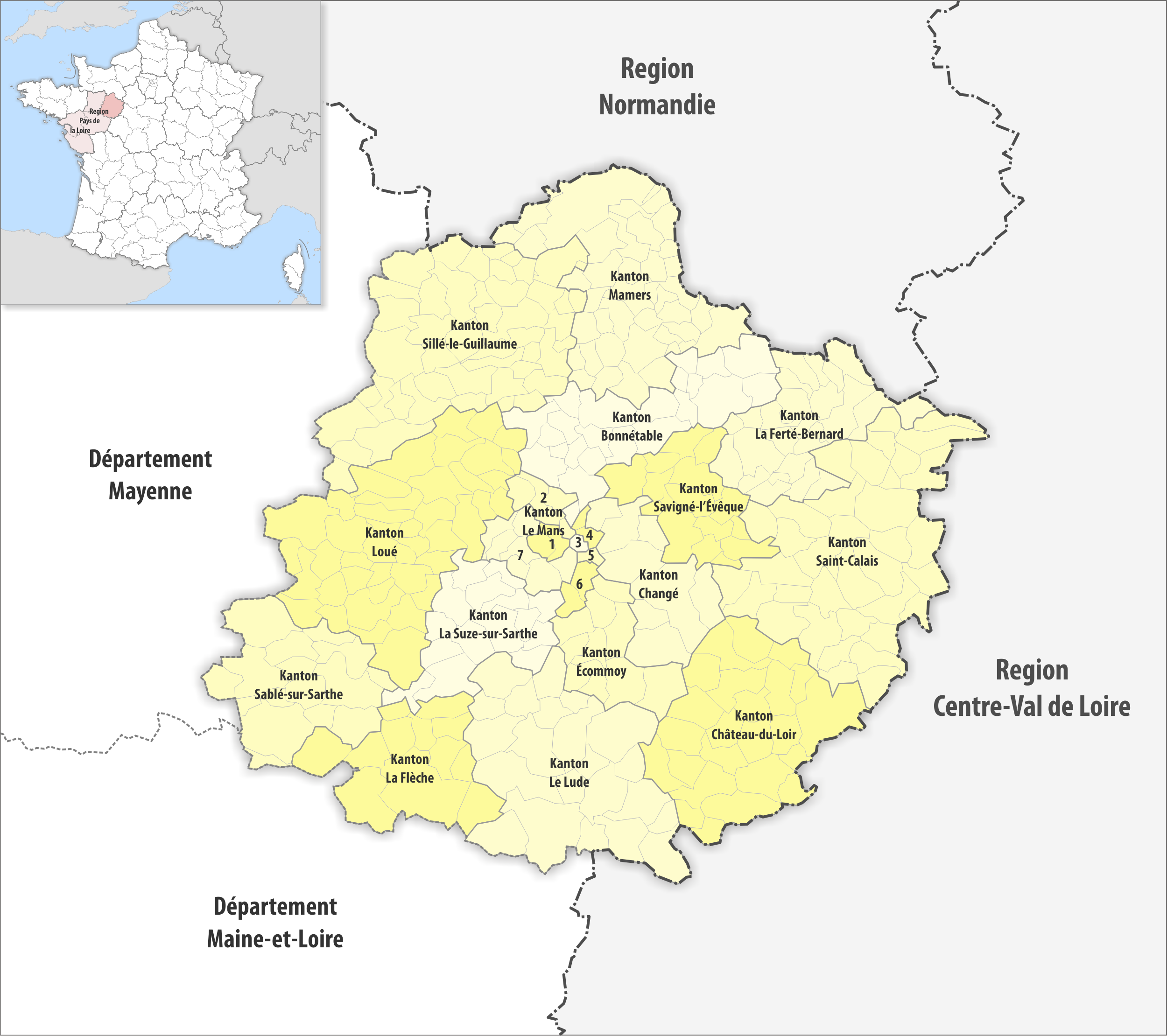 Gemeinden und Kantone im Departement Sarthe